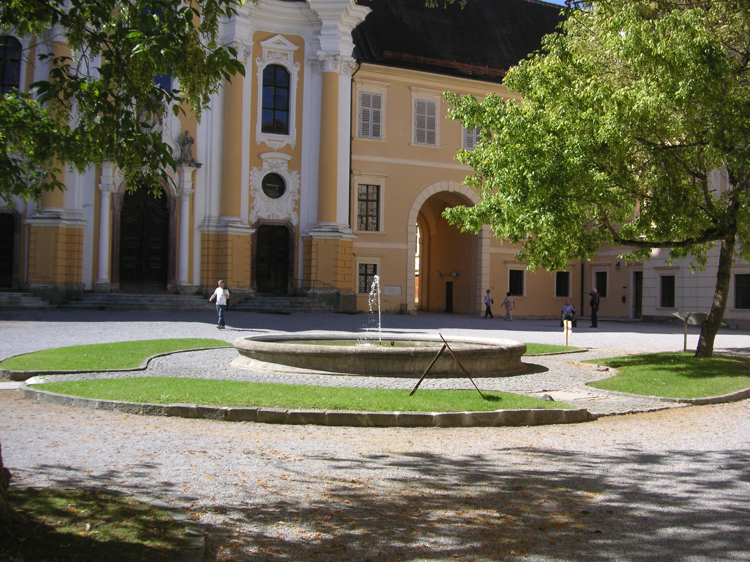 Der Brunnen im großen Stiftshof von Stift Rein